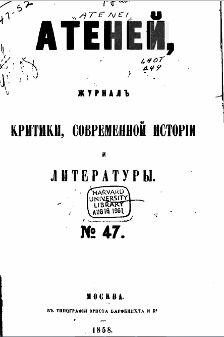 «Атеней», журнал критики, современной истории и литературы. № 47